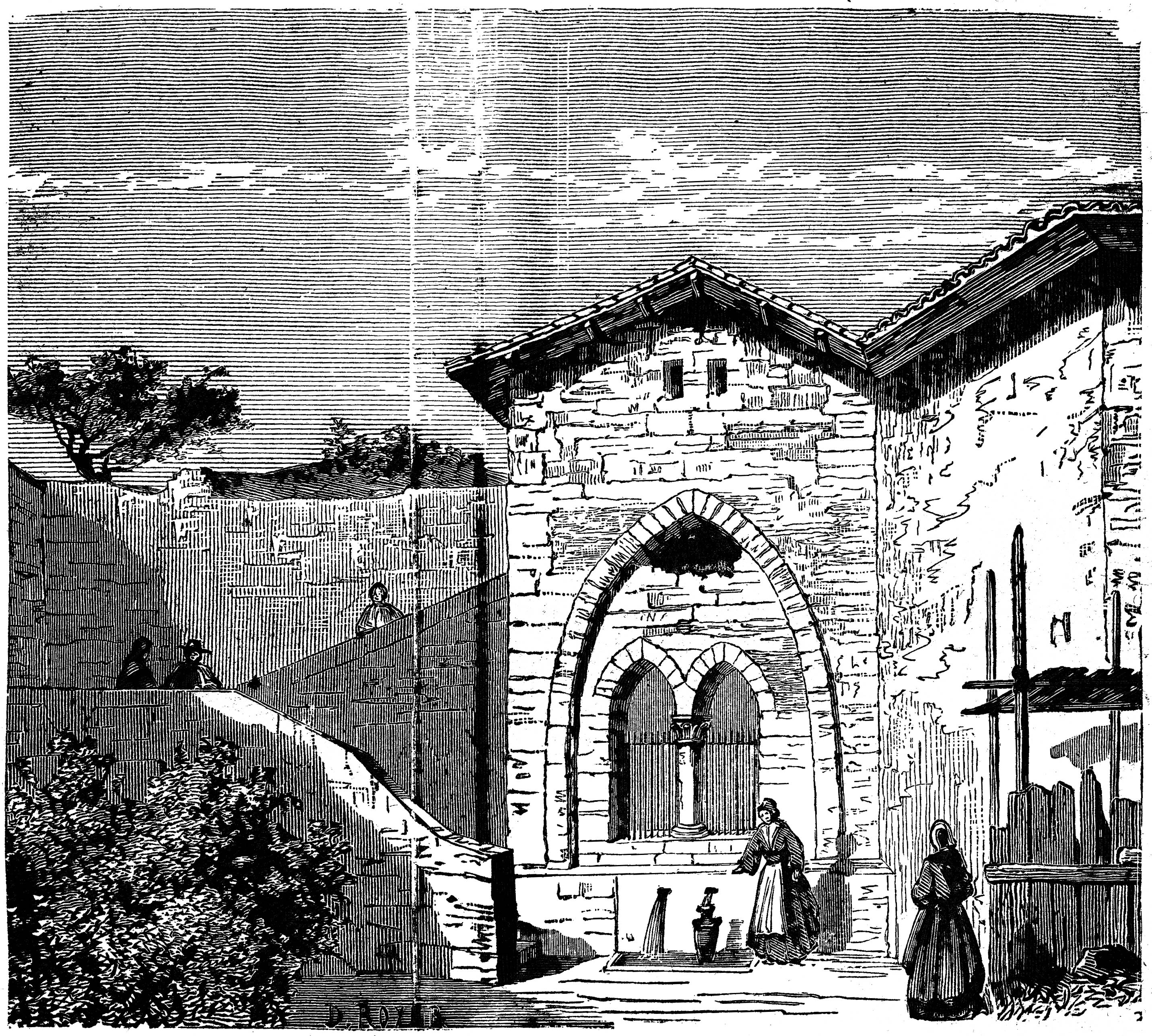 Fontaine de Délice (sic), en réalité fontaine Diane à Lectoure (Gers, France), gravure anonyme, in Eugène Trutat, Le Midi pittoresque, Limoges, M. Babou & Cie